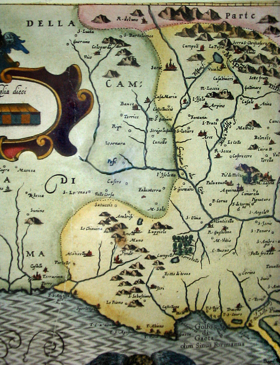 Mappa della Terra di Lavoro - particolare